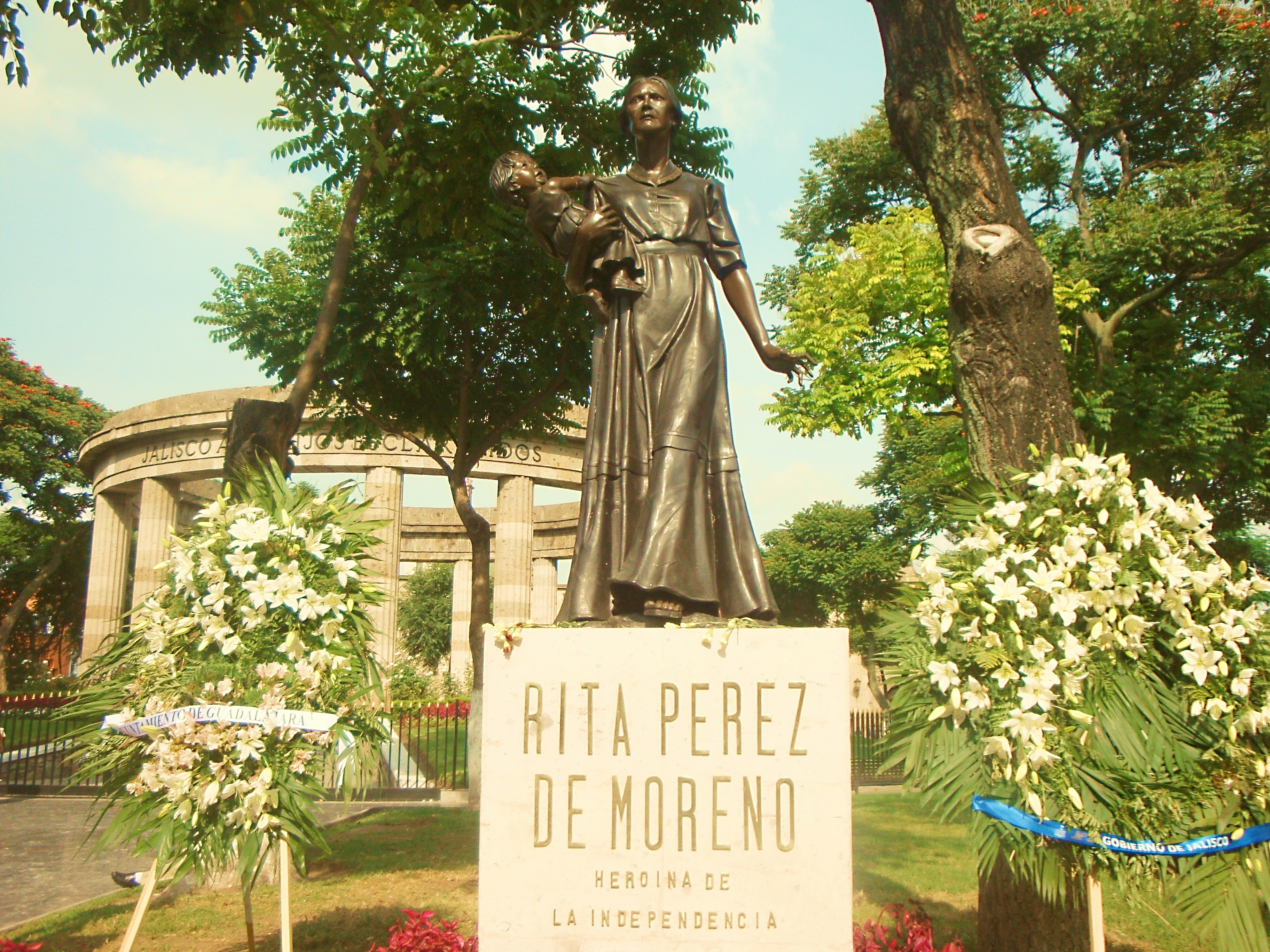 Estatua de Doña Rita Pérez de Moreno en Rotonda de los Jalicienses Ilustres en Guadalajara, México